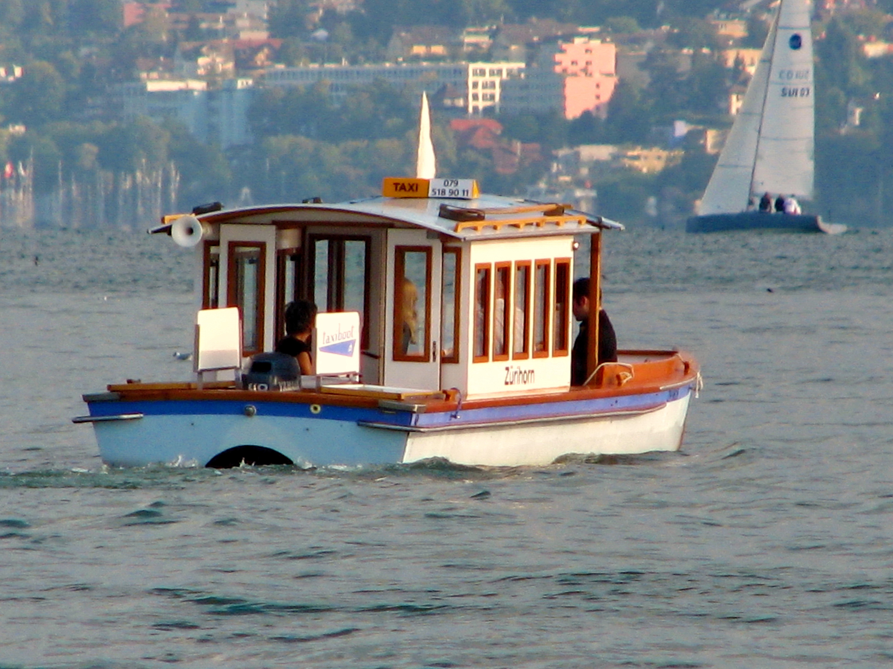 Wassertaxi Zürihorn near Zürich-Riesbach (Switzerland), Thalwil in the background.